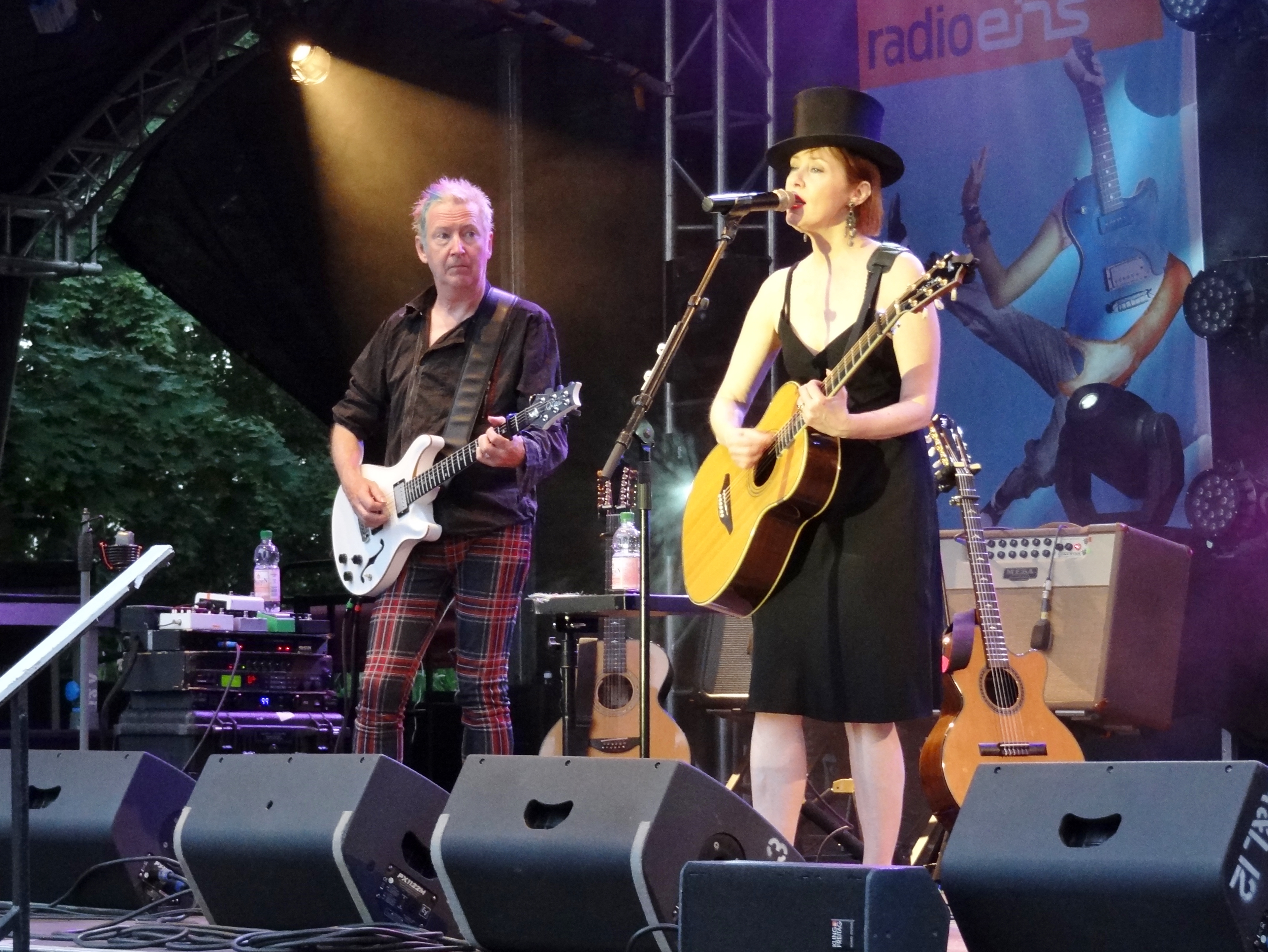 Suzanne Vega mit Gerry Leonard beim 13. Inselleuchten-Festival in Marienwerder, Land Brandenburg, Deutschland